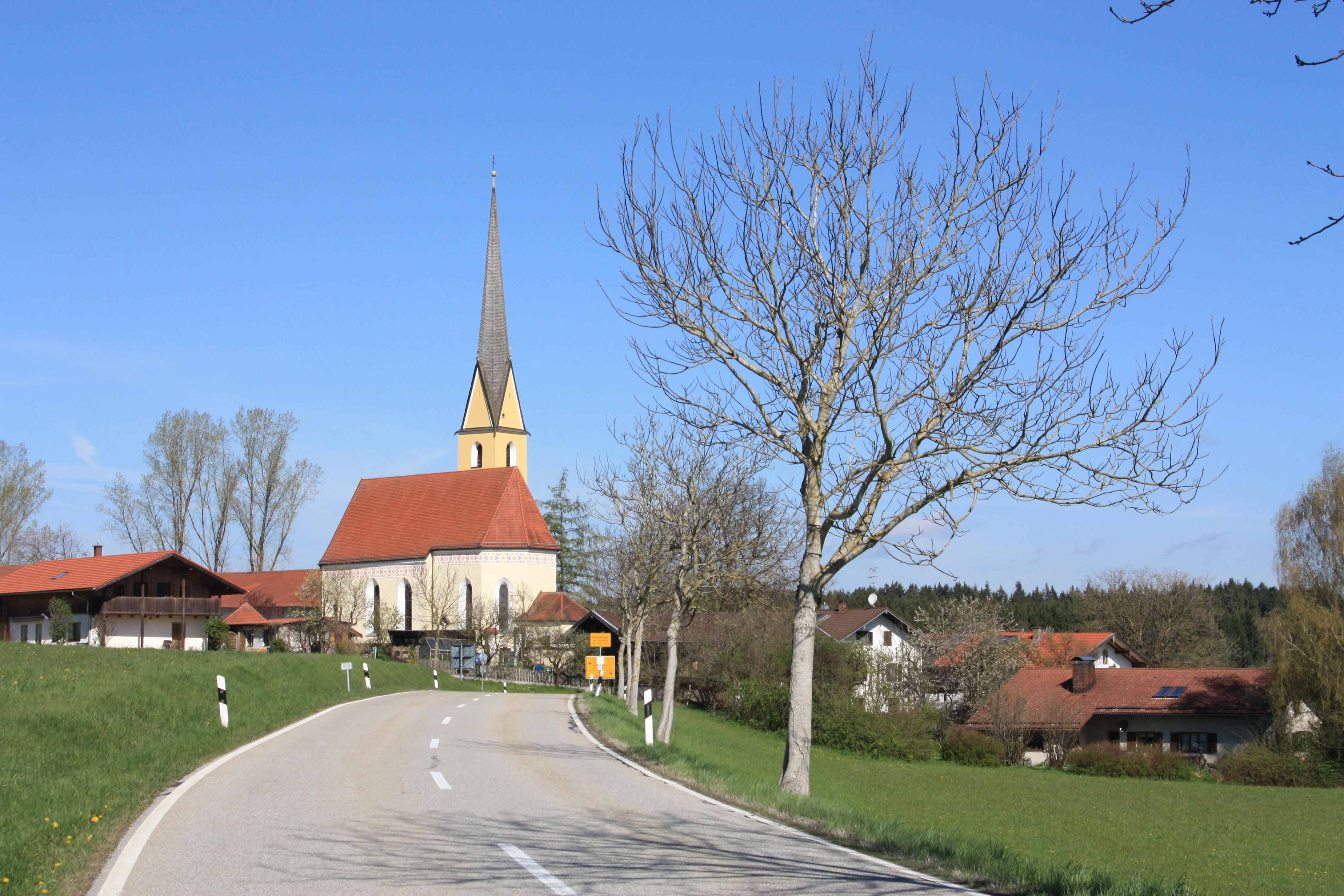 Babensham OT Kirchloibersdorf